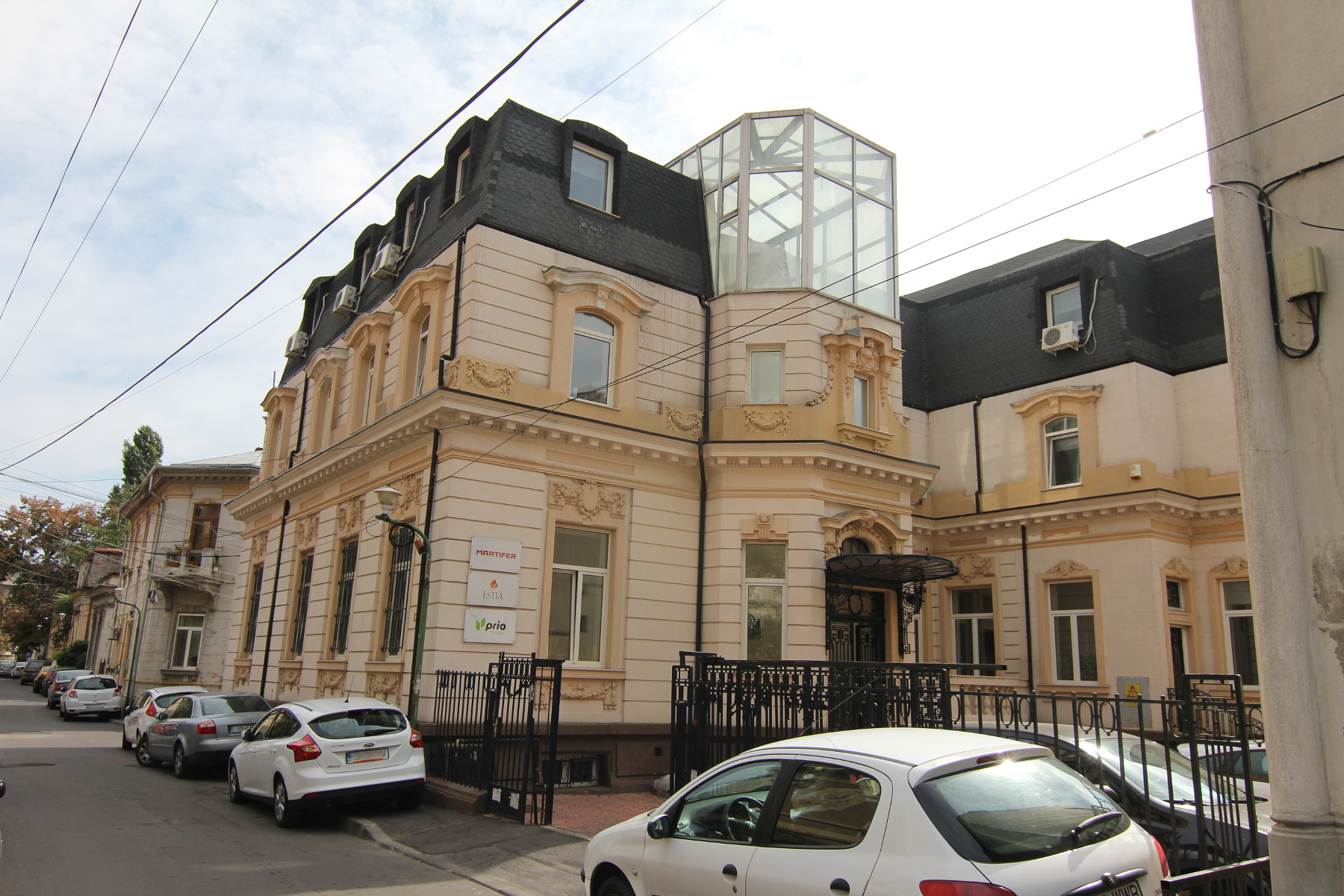 Casă pe Stelea Spătarul